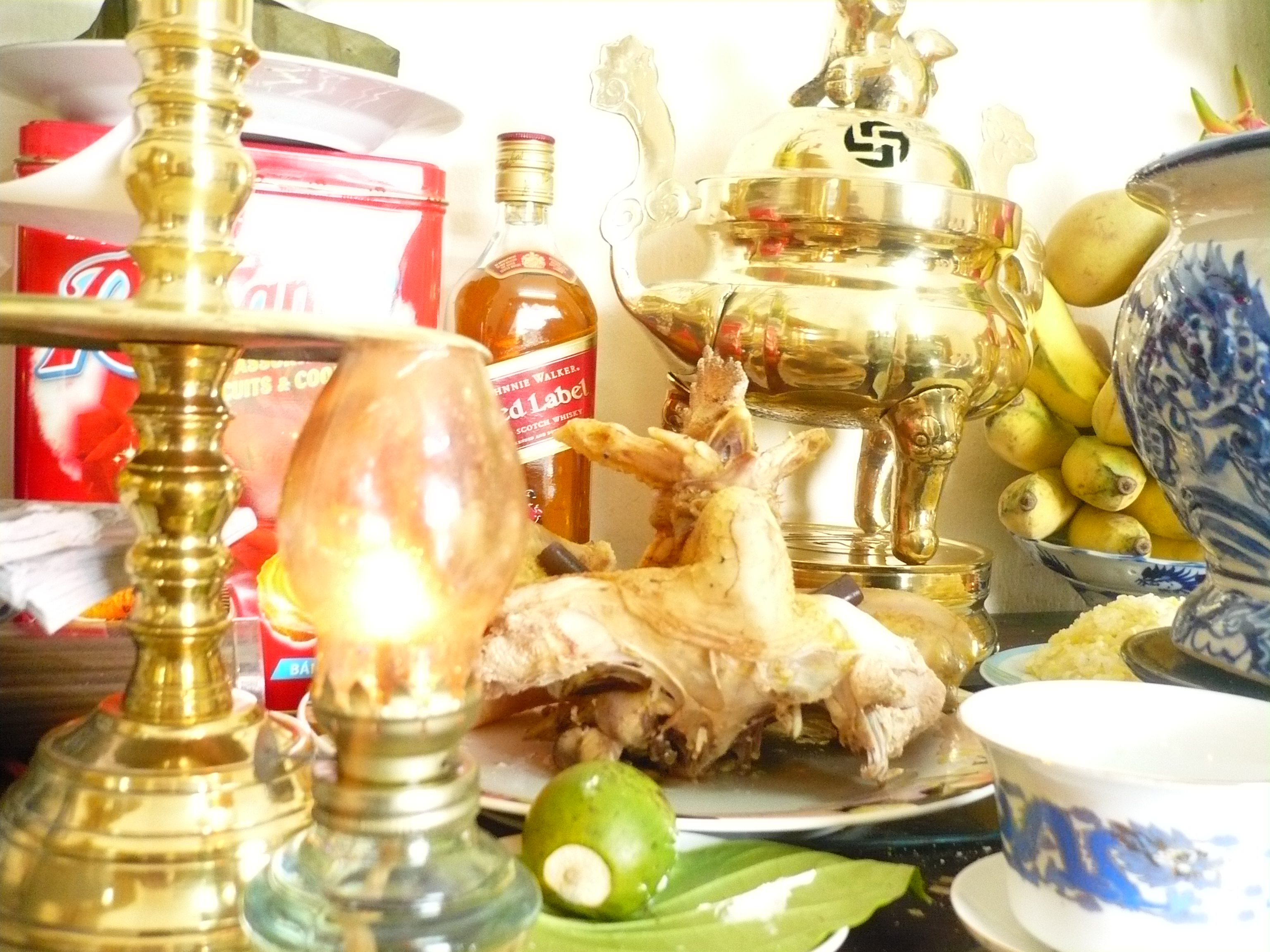 Hình tự chụp để minh họa cho bài viết